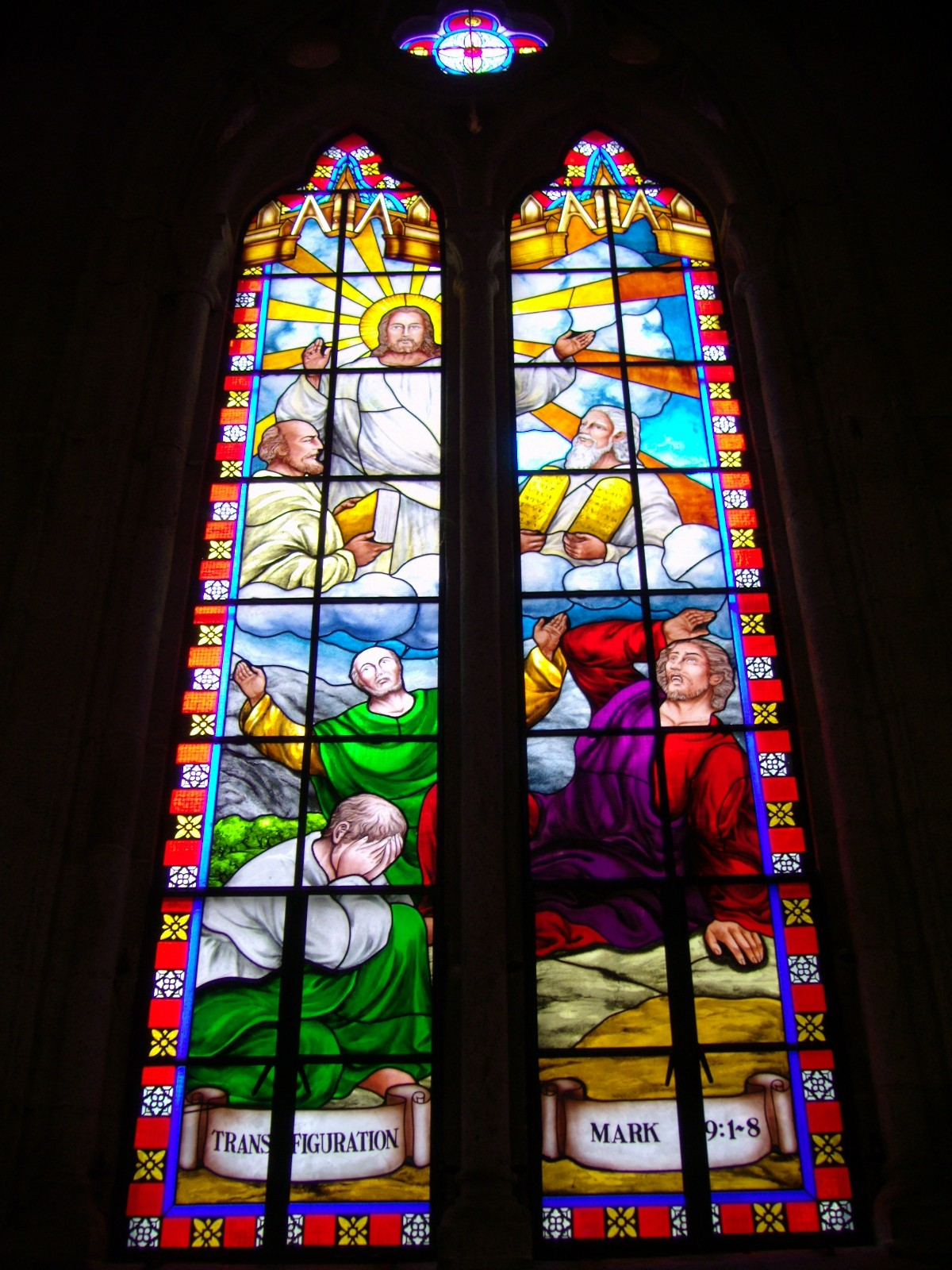 石室教堂的彩窗